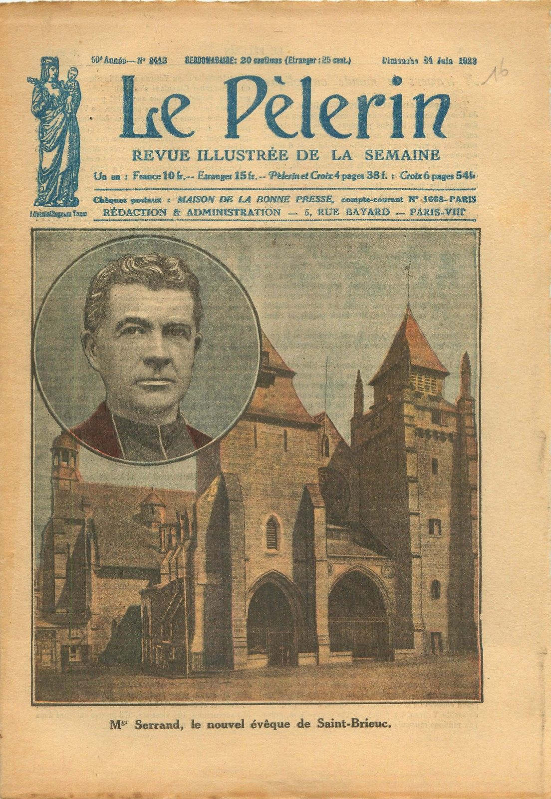 Couverture du Pèlerin. 1923. Mgr Serrand évêque de Saint-Brieuc.